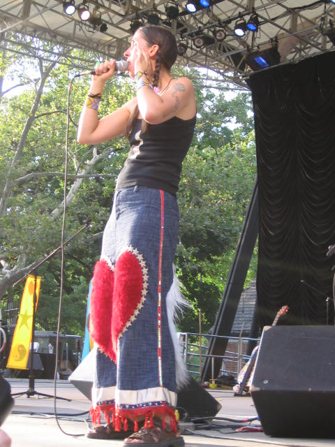 Andrea Echeverry 6 de agosto, 2005